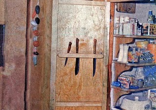 El cuchillero de la cocina